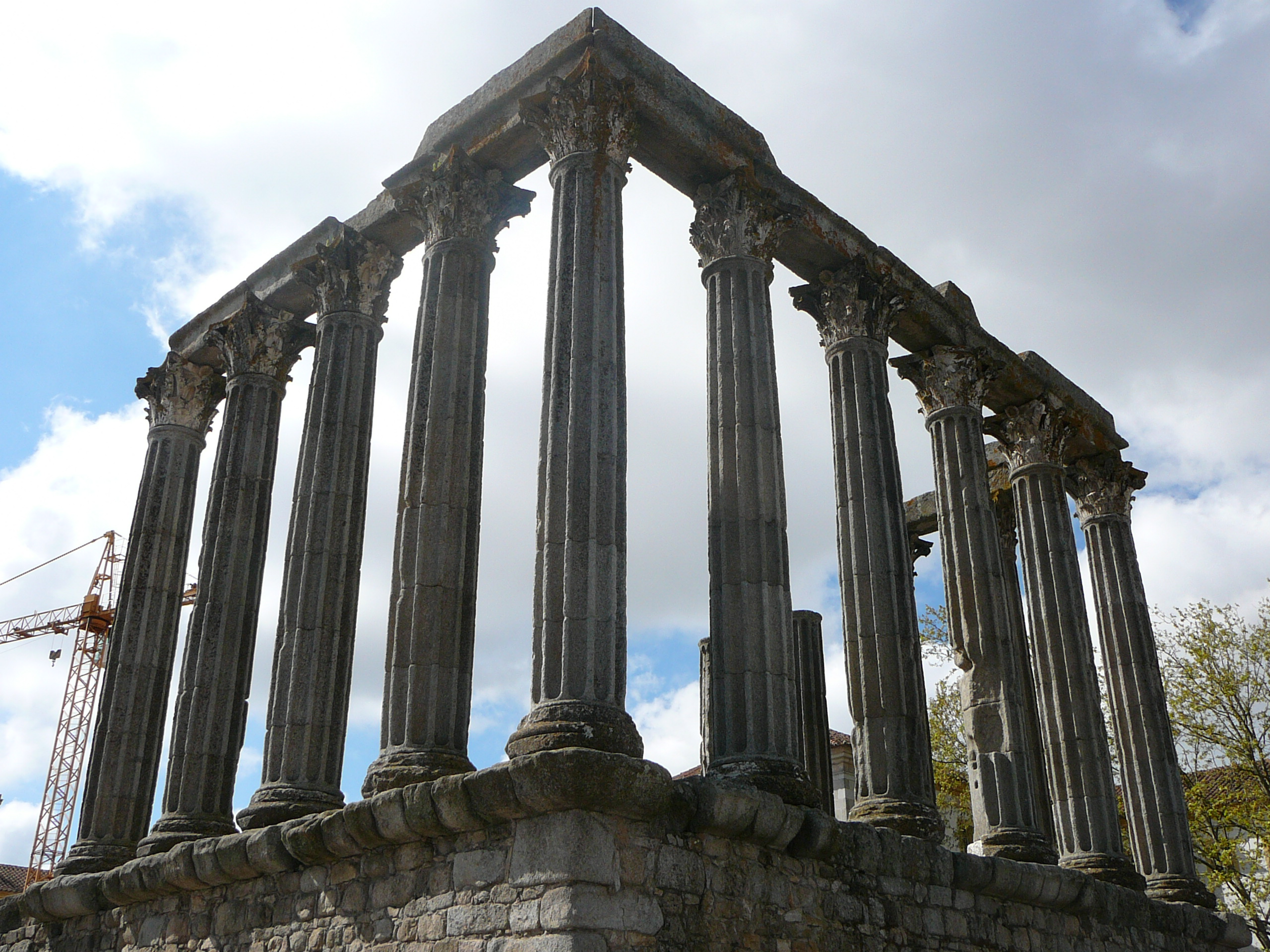 Starorímsky chrám v Évore